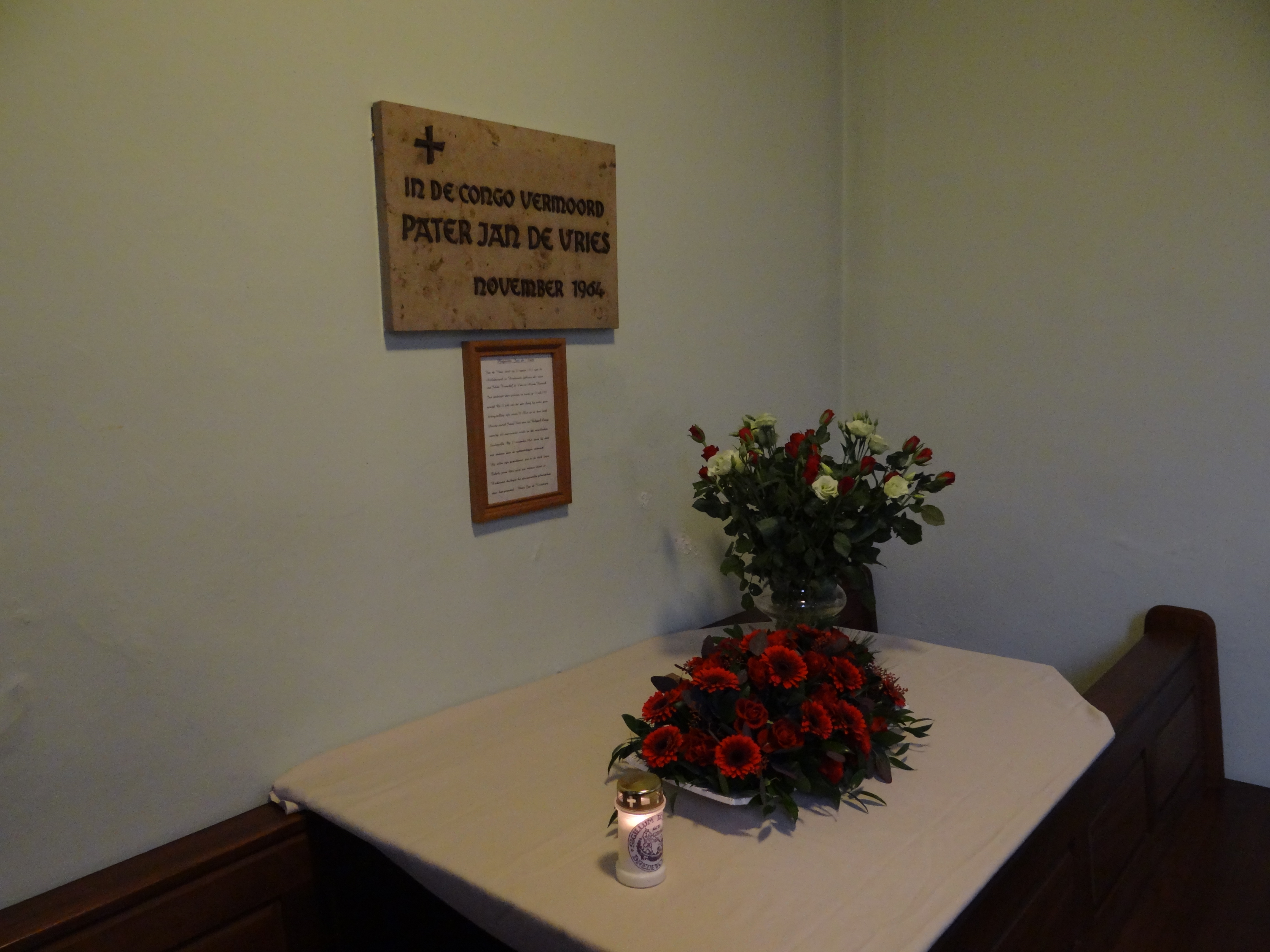 Gedenksteen Pater Jan de Vries